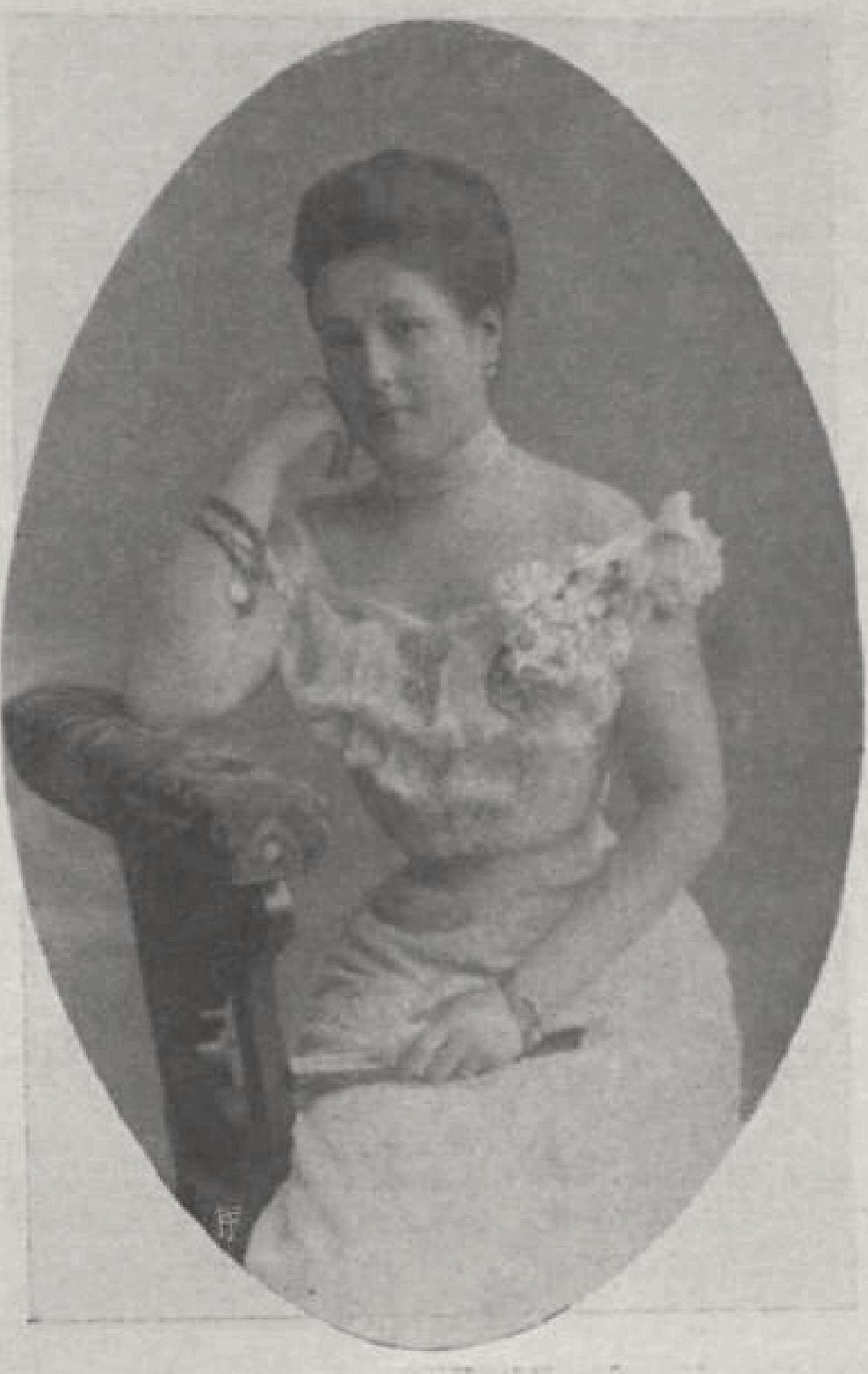 Habsburg–Tescheni Mária Anna főhercegnő (1882–1940), Habsburg–Tescheni Frigyes főherceg leánya, Illés Bourbon–pármai herceg felesége.